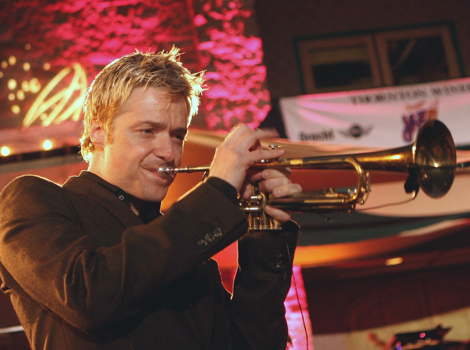 7218-HiRes-Botti@Ts06